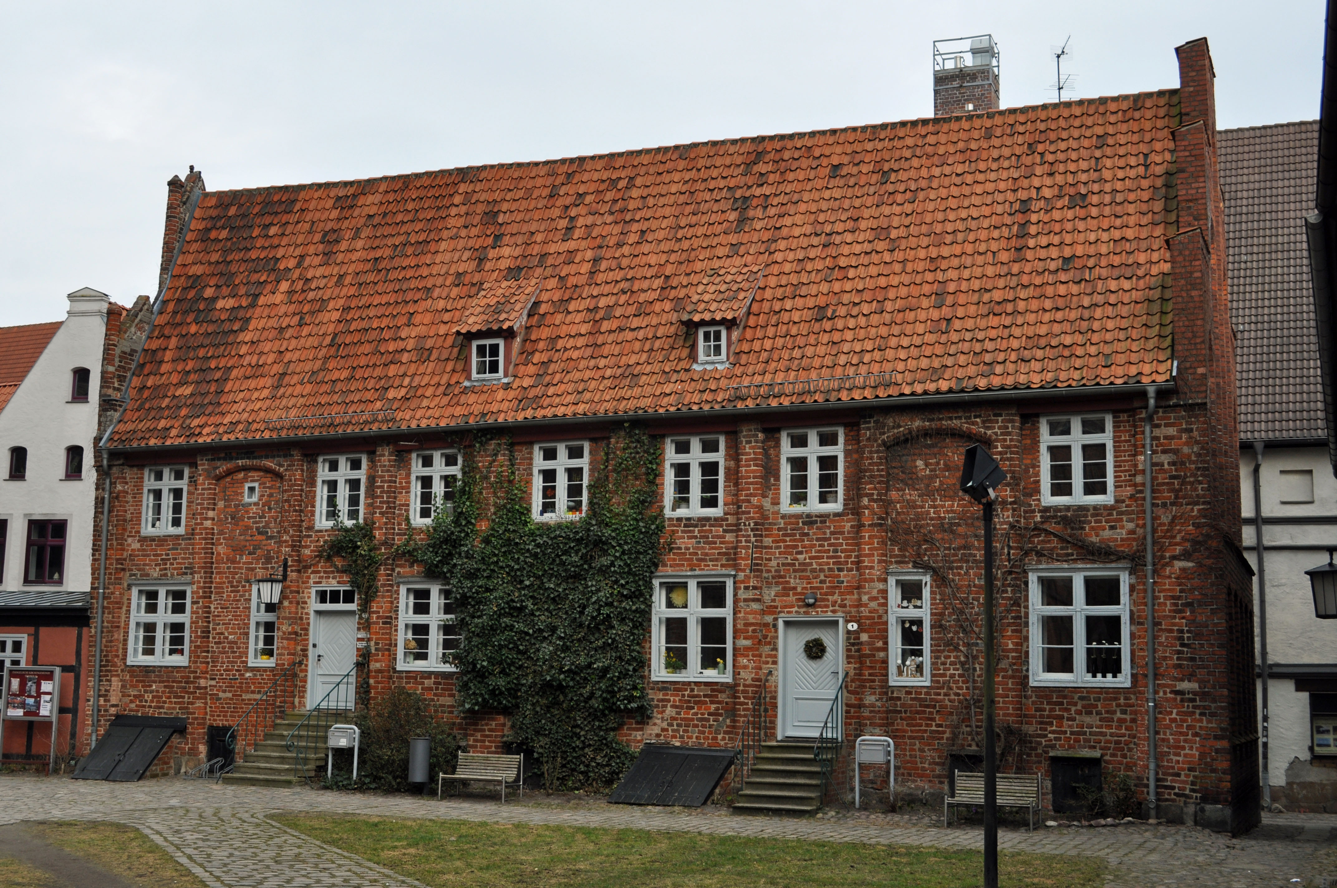 Gebäude bzw. Gebäudedetail in Stralsund. Straße und Hausnummer siehe Dateiname.